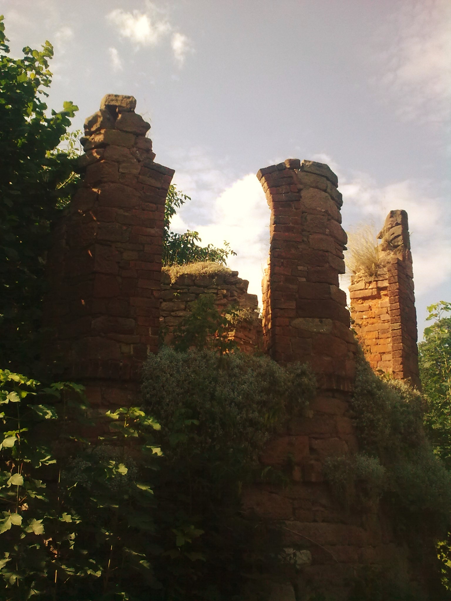 Krajanów. Ruiny baszty przy zespole dworskim